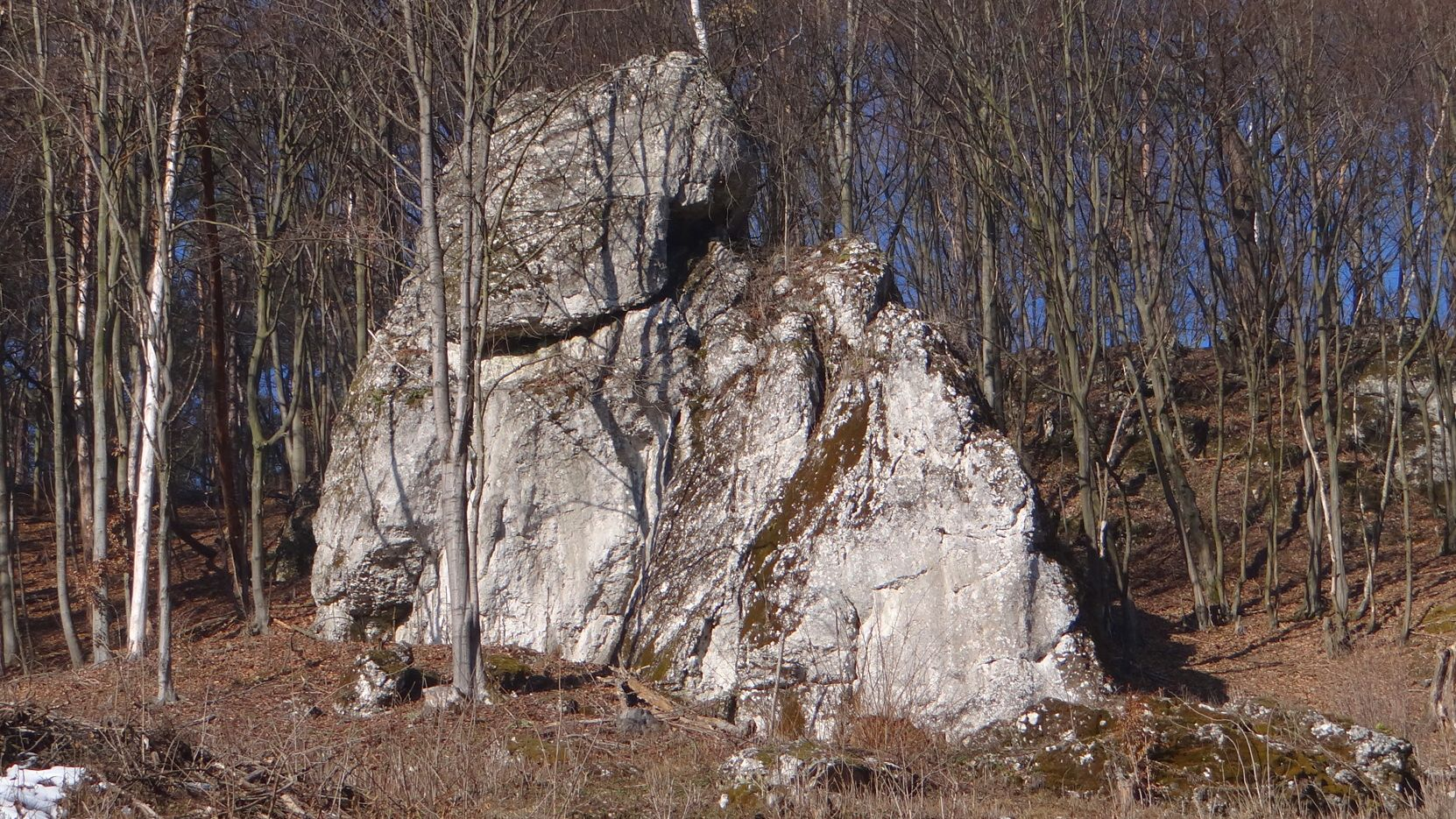 Skała Wietrznik w Dolinie Będkowskiej